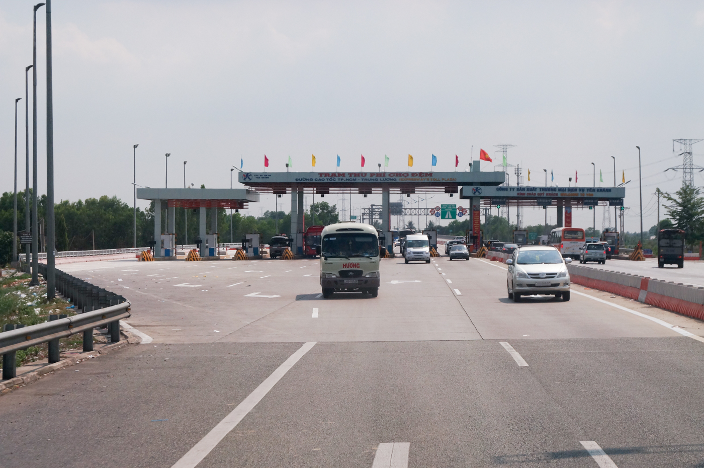 Trạm thu phí Chợ Đệm, Đường cao tốc TP.HCM - Trung Lương, một phần của Đường cao tốc Bắc - Nam, Việt Nam.